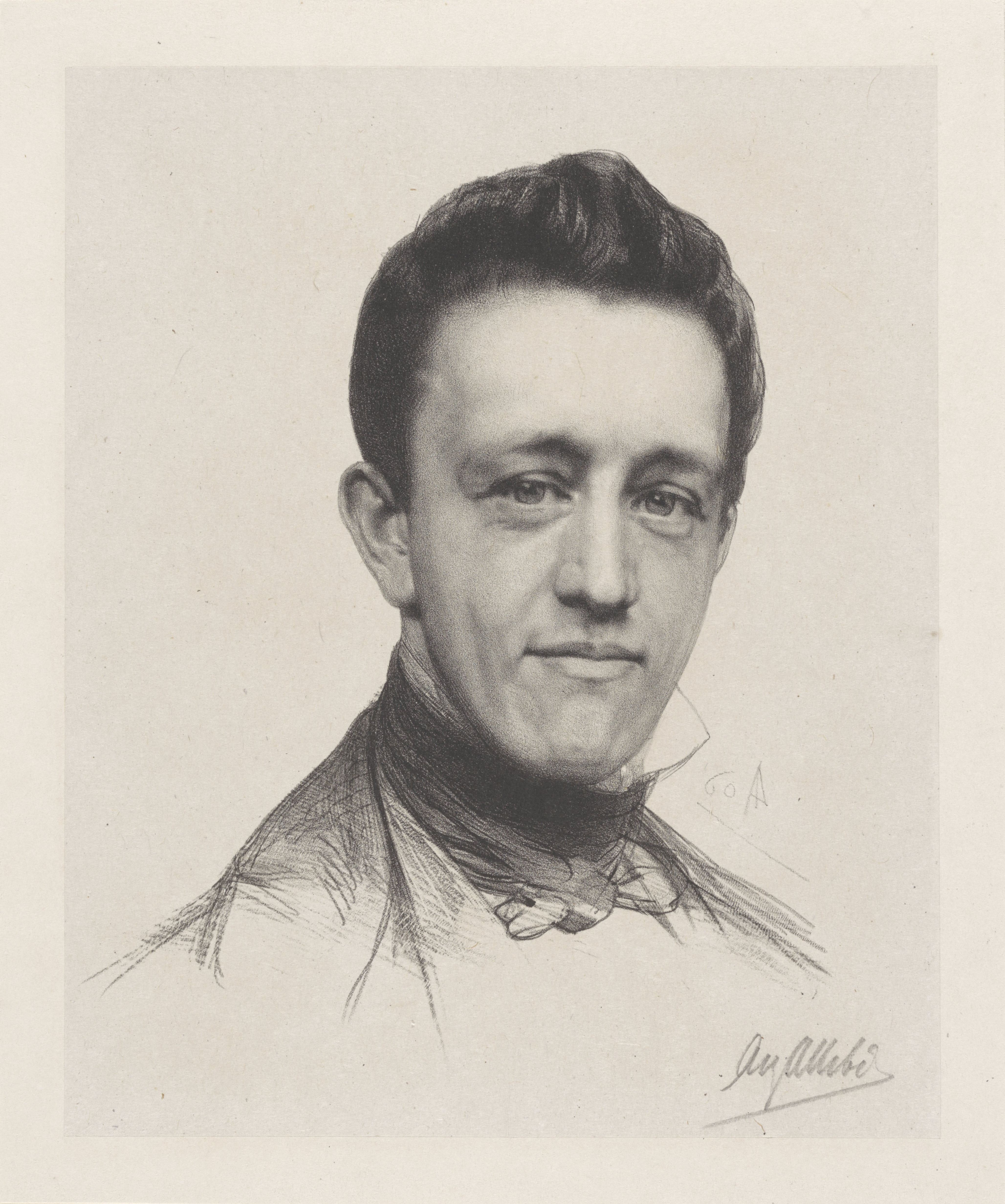 IdentificatieTitel(s): Portret van uitgever Gualtherus KolffObjecttype: prent Objectnummer: RP-P-1911-3865Catalogusreferentie: Stuers 27Opschriften / Merken: opschrift, recto, handgeschreven: ‘Au Allebé’verzamelaarsmerk, verso, gestempeld: Lugt 2228VervaardigingVervaardiger: prentmaker: August Allebé (vermeld op object)Plaats vervaardiging: AmsterdamDatering: 1860Fysieke kenmerken: lithografieMateriaal: papier Techniek: lithografie (techniek)Afmetingen: blad: h 230 mm × b 195 mmOnderwerpWat: historical personspublishing, publisherWie: Gualtherus KolffVerwerving en rechtenVerwerving: aankoop 1911Copyright: Publiek domein